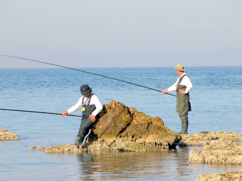 דיג חובבים. צולם ע"י אליעזר שוורץ, ירושלים.